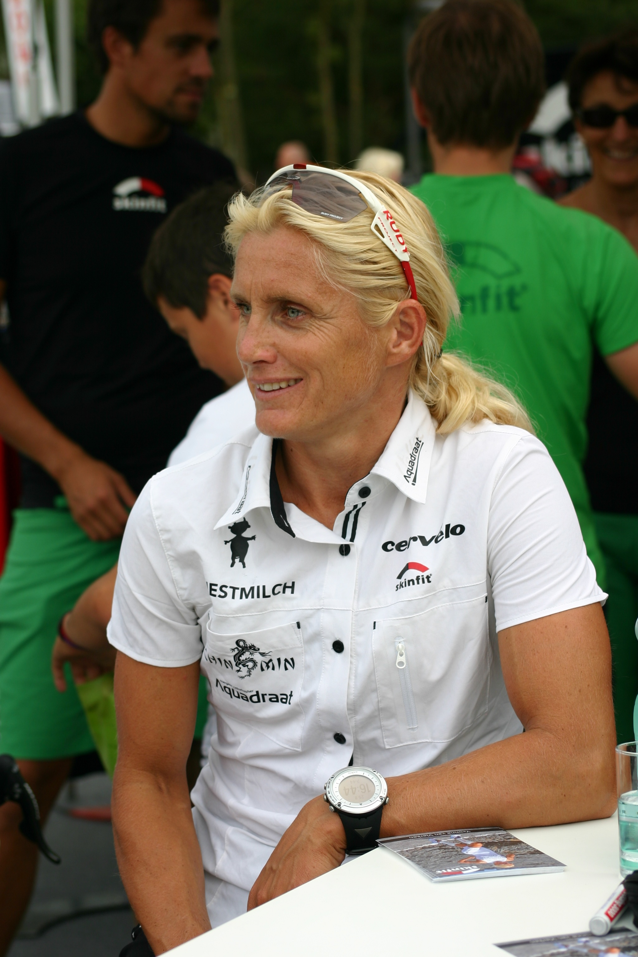 Yvonne van Vlerken bei der Autogrammstunde am Vortag des Trans Vorarlberg Triathlon